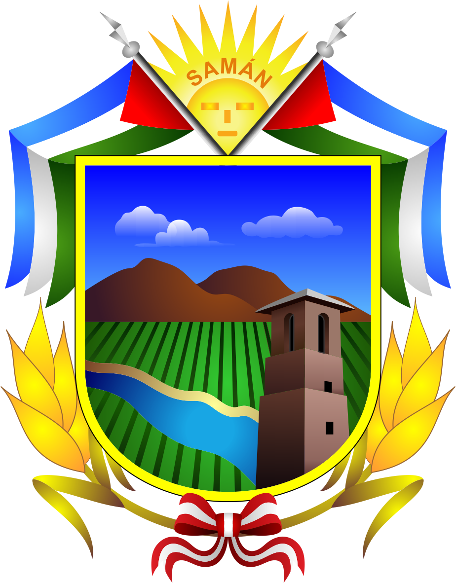 Distrito de Samán - Provincia de Azángaro - Región Puno